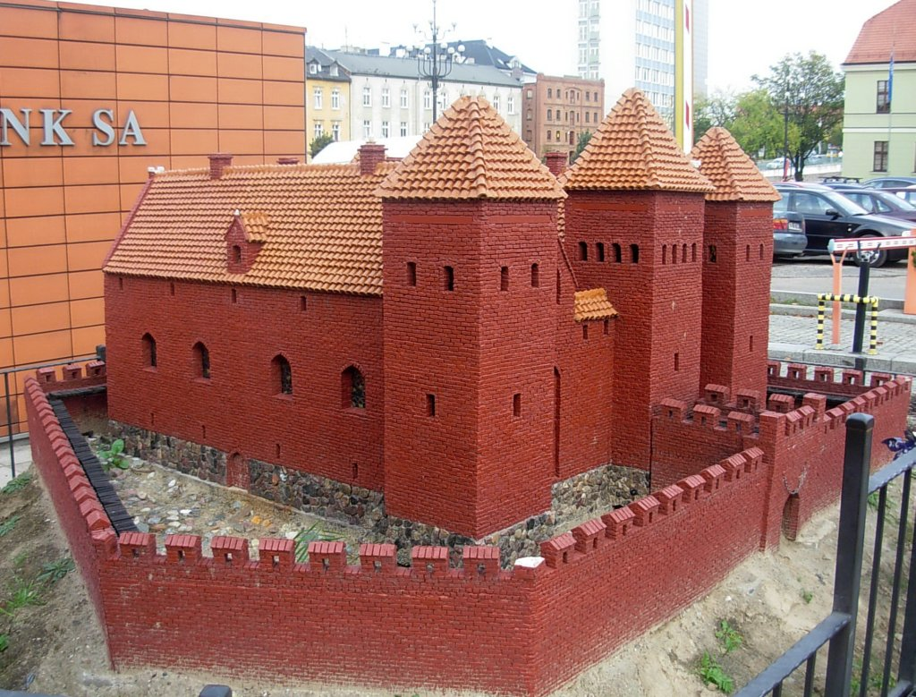 Makieta zamku bydgoskiego, stojąca przy BRE Banku na ul. Grodzkiej w Bydgoszczy